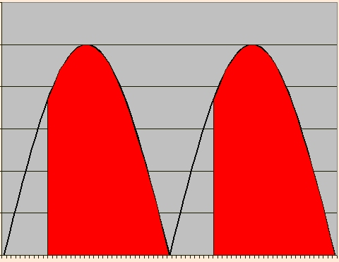 Thyristorregeling